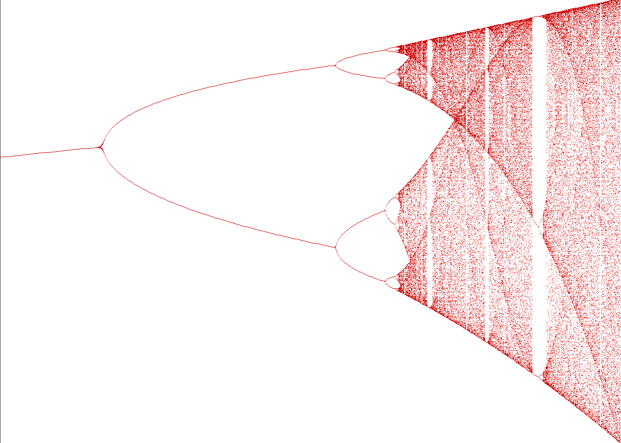 bifurcatie diagram van de logistische afbeelding